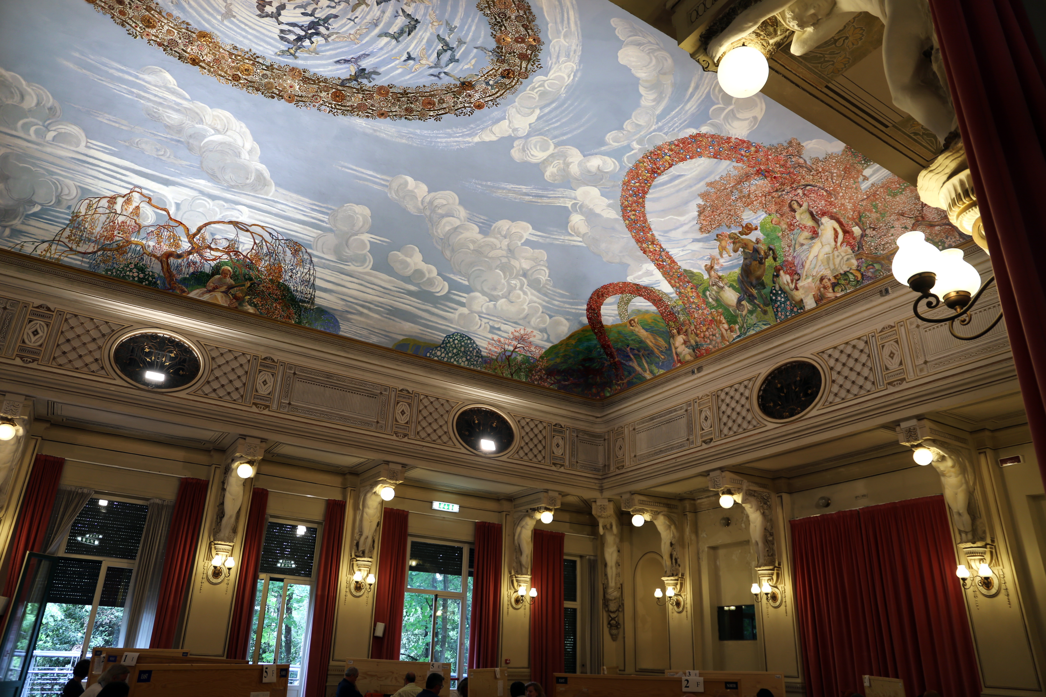 Palazzo dei Congressi (Salsomaggiore Terme) This is a photo of a monument which is part of cultural heritage of Italy.